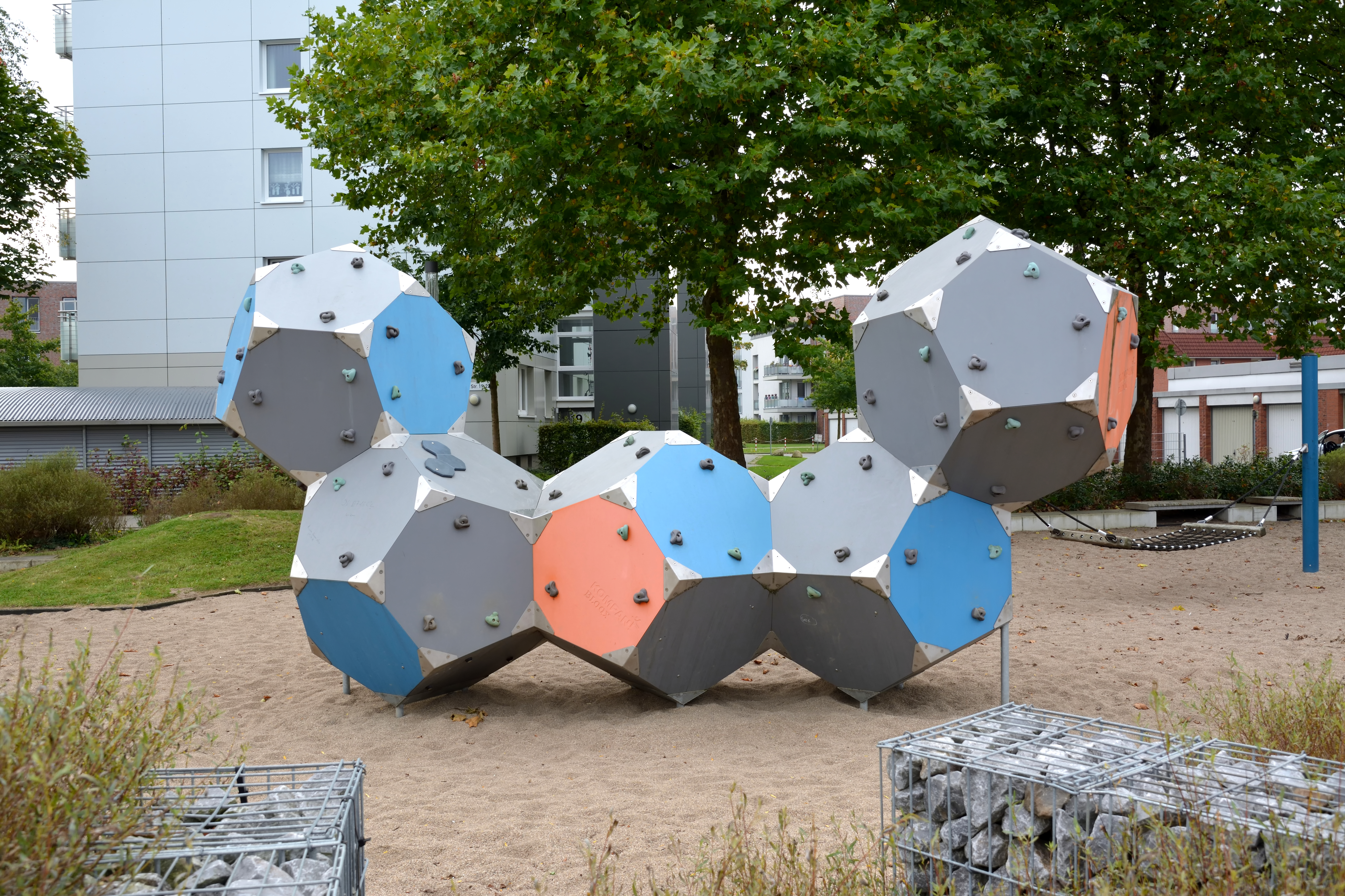 Eine künstliche Kletteranlage auf einem Spielplatz in Elmshorn.